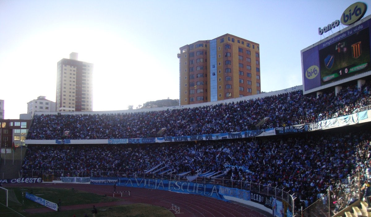 Curva Norte Estadio Hernando Siles La paz - Bolivia (La vieja escuela)